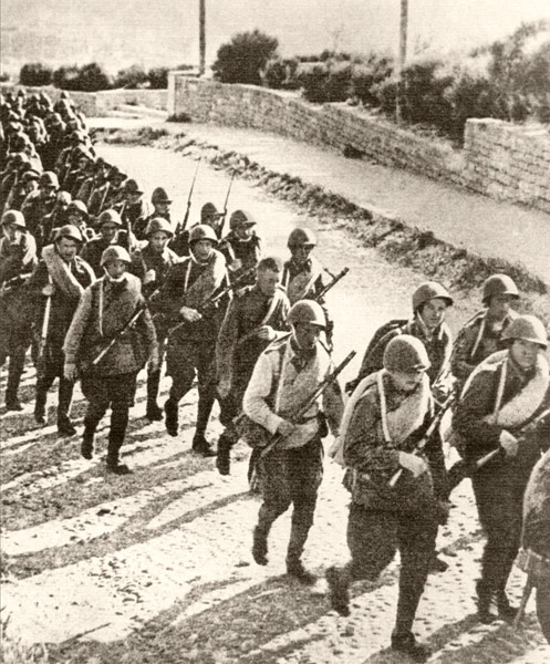 Батальон, отправляющийся на фронт, по дороге к станции Баладжары (Баку, р-н Чемберикенда, 1942г.)